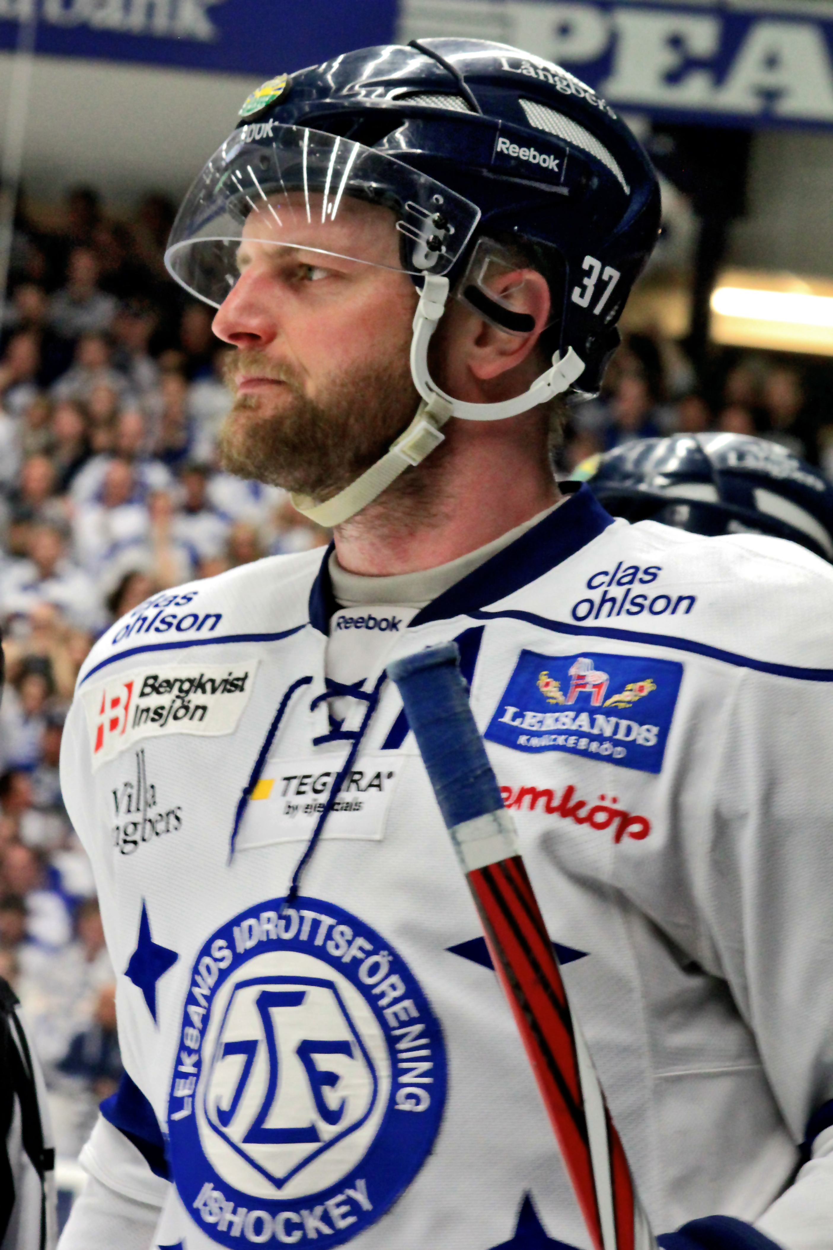 Mattias Timander i kvalmatchen mellan Leksands IF och Djurgårdens IF i Leksand 2012-03-31